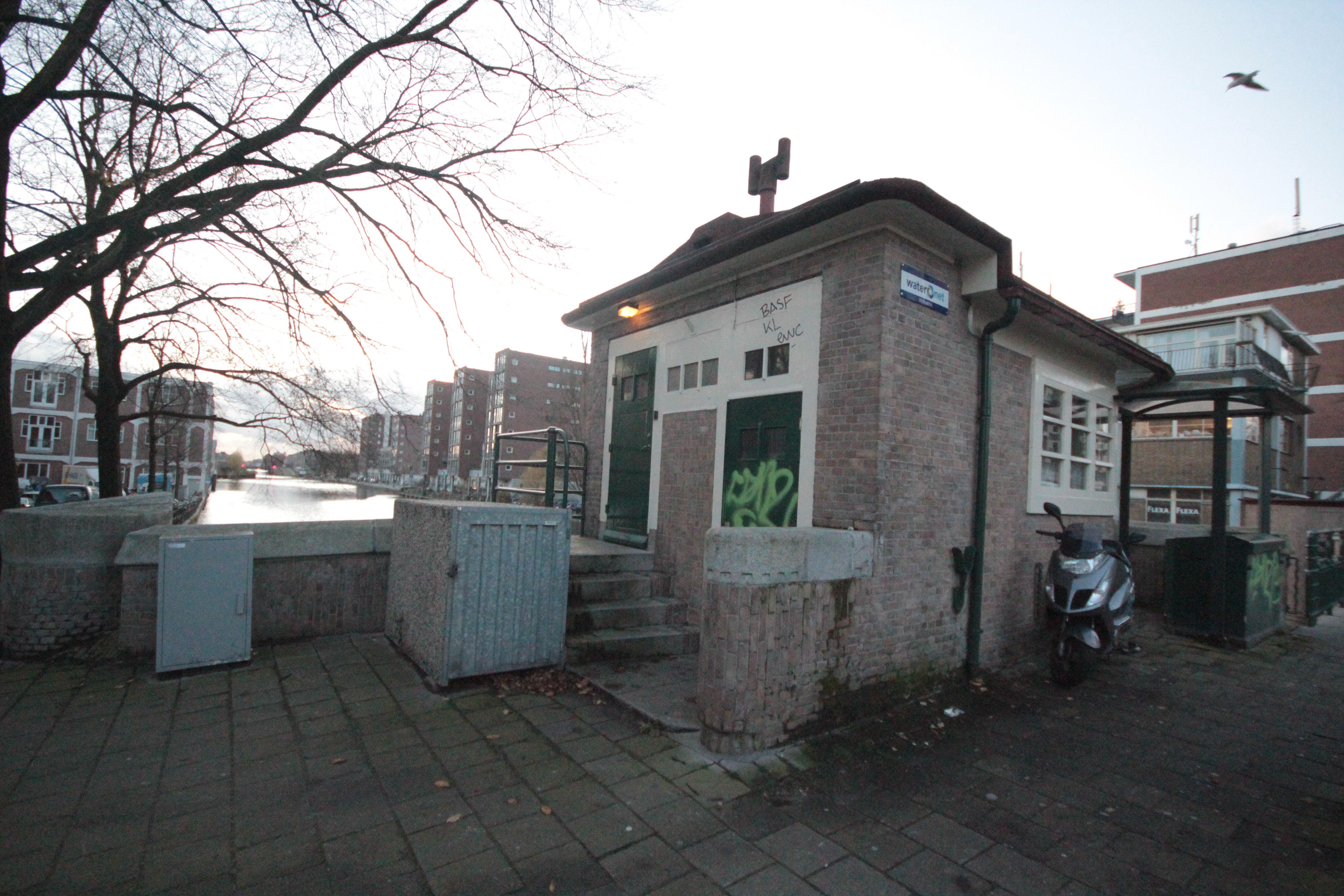 Het brugwachtershuis van de Van Hallbrug over de Kostverlorenvaart in Amsterdam